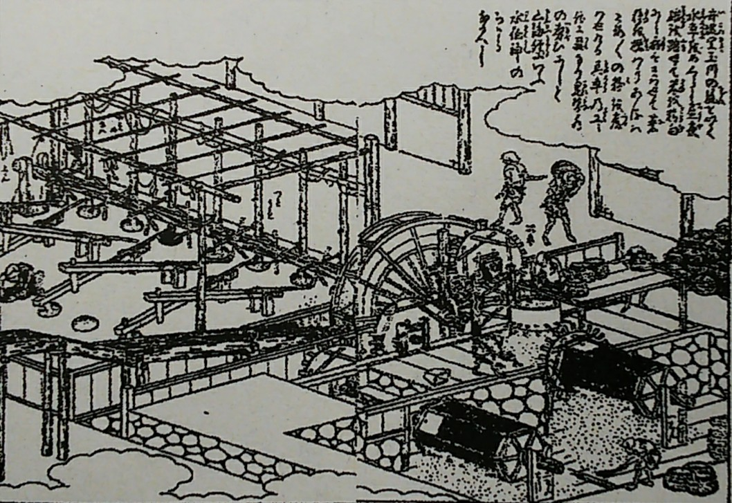 拾遺都名所図会『井手町玉川』